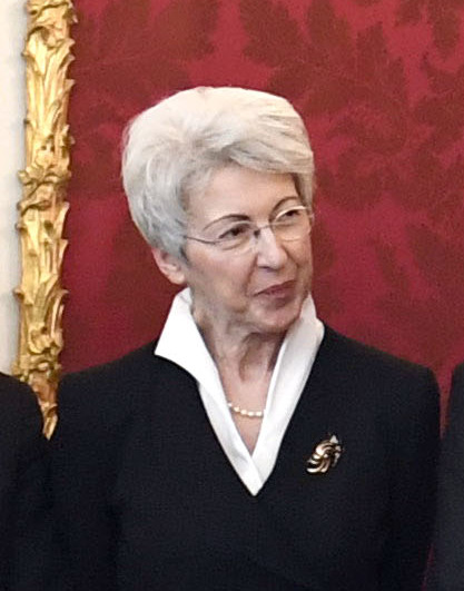 Am 3. Juni 2019 wurde Mag. Alexander Schallenberg als Bundesminister für Europa, Integration und Äußeres angelobt. Foto: Mahmoud